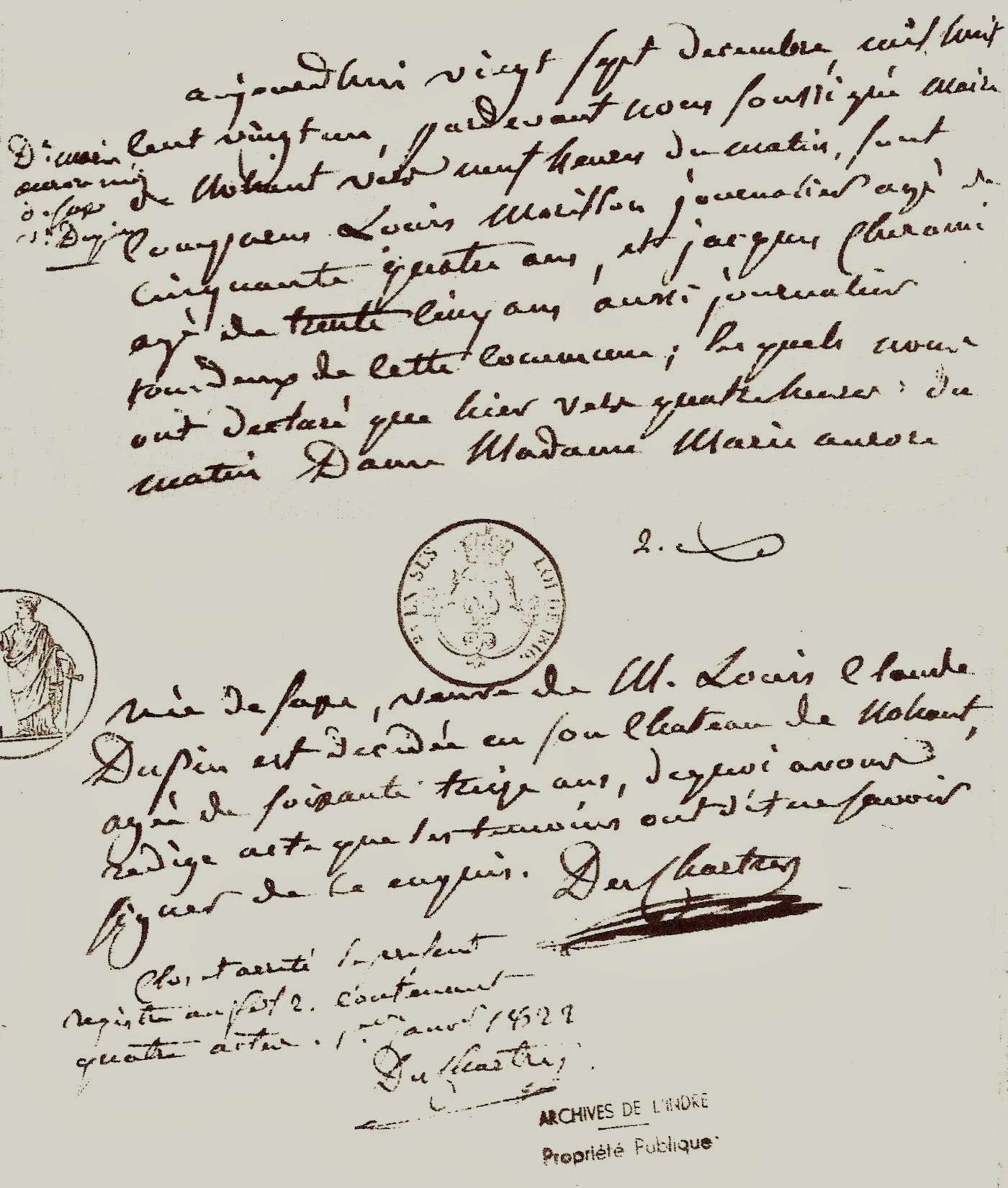 Acte de décès de Marie-Aurore de Saxe (1748-1821), grand-mère paternelle de George Sand, morte à Nohant le 26 décembre 1821. L'acte de décès original est sur deux feuillets. Acte d'état civil n°4, mais porte le n°2 dans la table alphabétique.